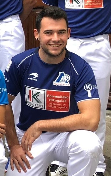 Erik Jaka esku-huskako pilotaria, 2018ko Lau eta Erdiko Txapelketaren aurkezpenean.